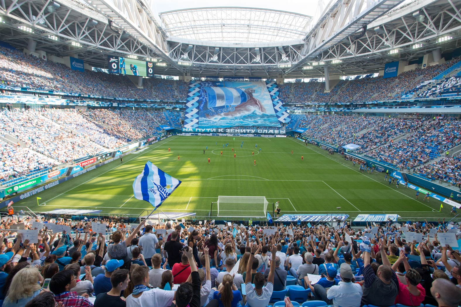 04.08.2018. Россия, Санкт-Петербург, стадион «Санкт-Петербург». Чемпионат России 2018/19, 2-ой тур, «Зенит» — «Арсенал»